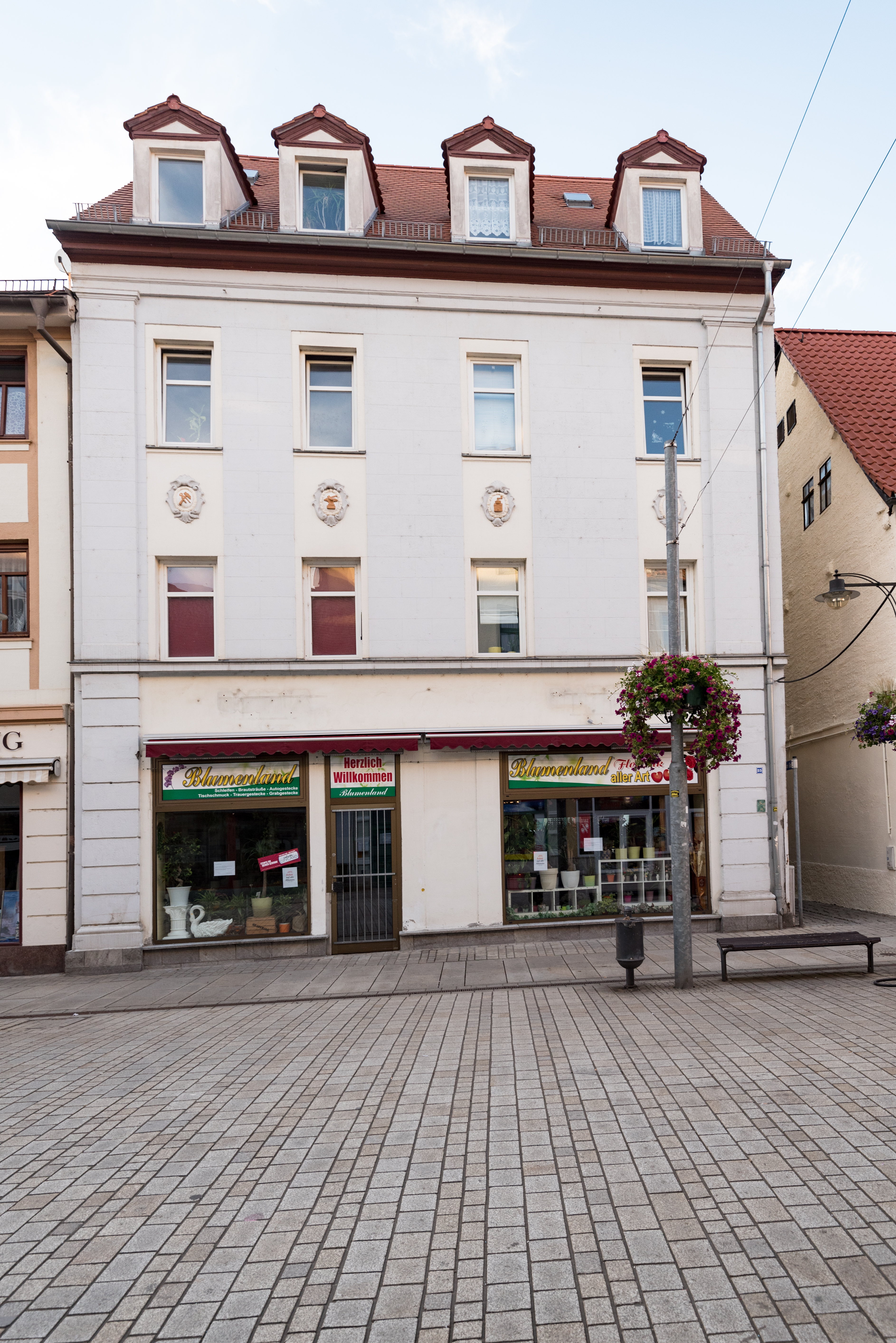 Weißenfels, Jüdenstraße 25